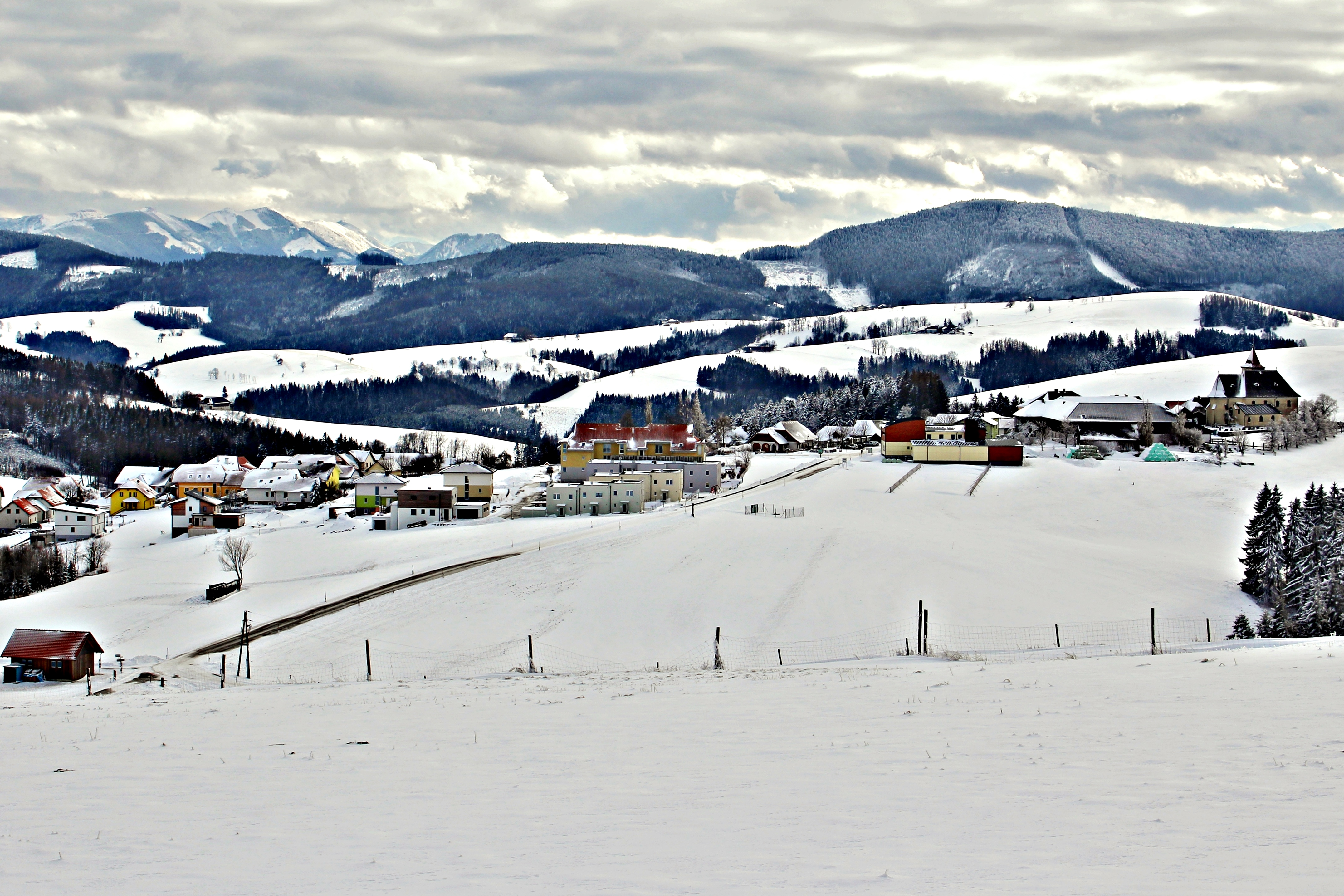 Winter im Mostviertel - Alpenvorland